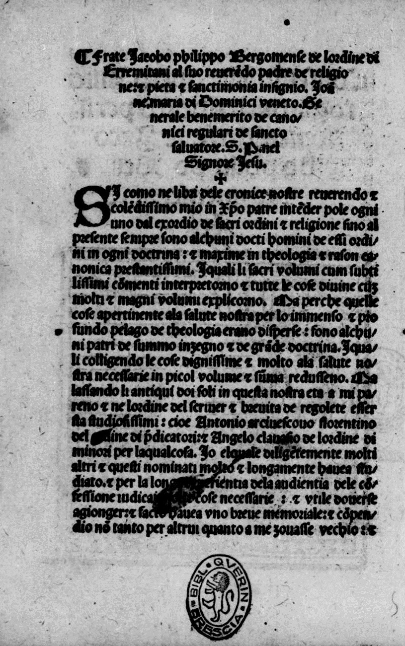 Frontespizio